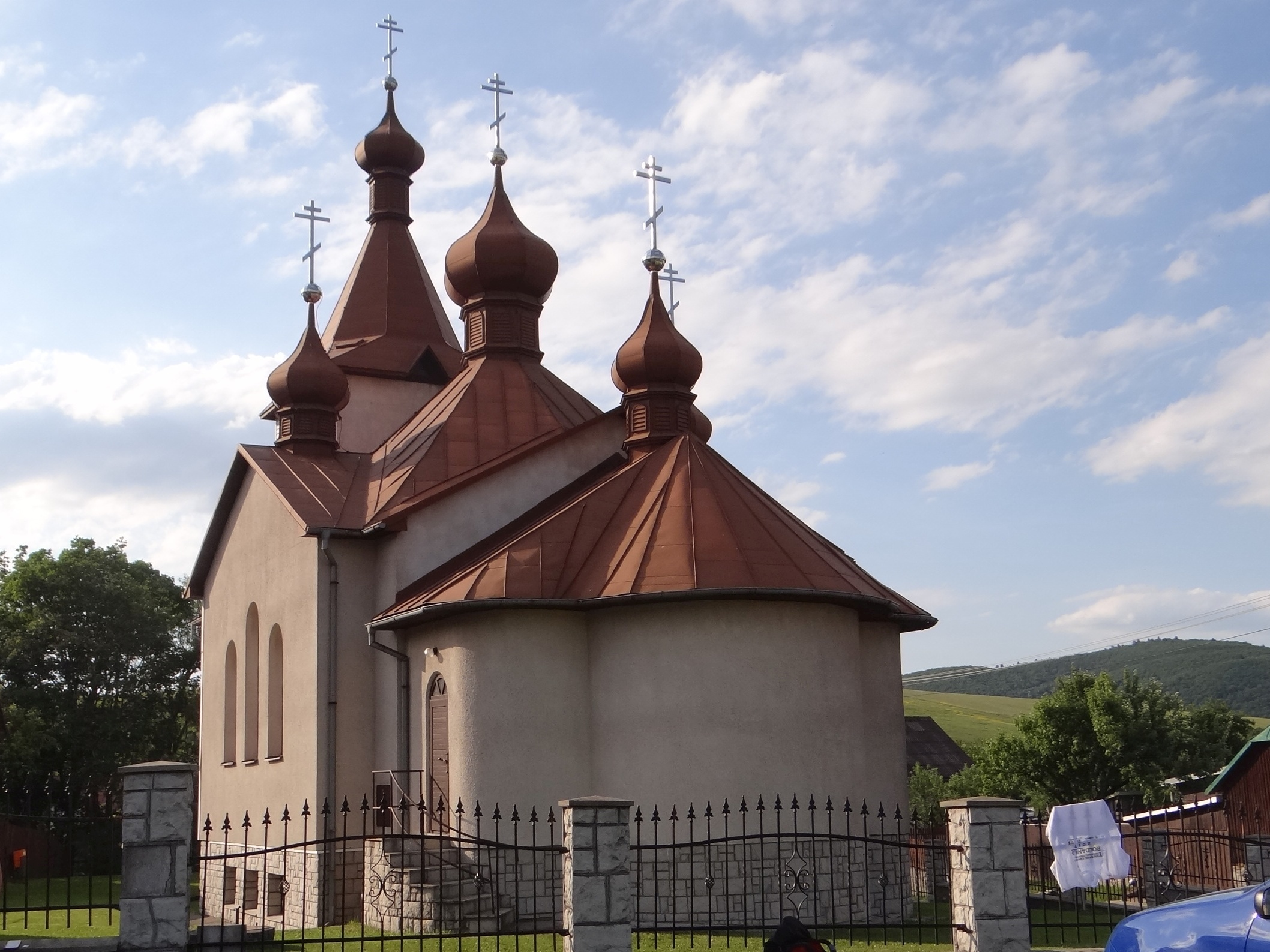 Bajerovce